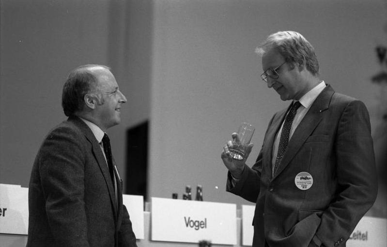 2.-5.11.1981 30. Bundesparteitag der CDU in Hamburg in Congress Centrum